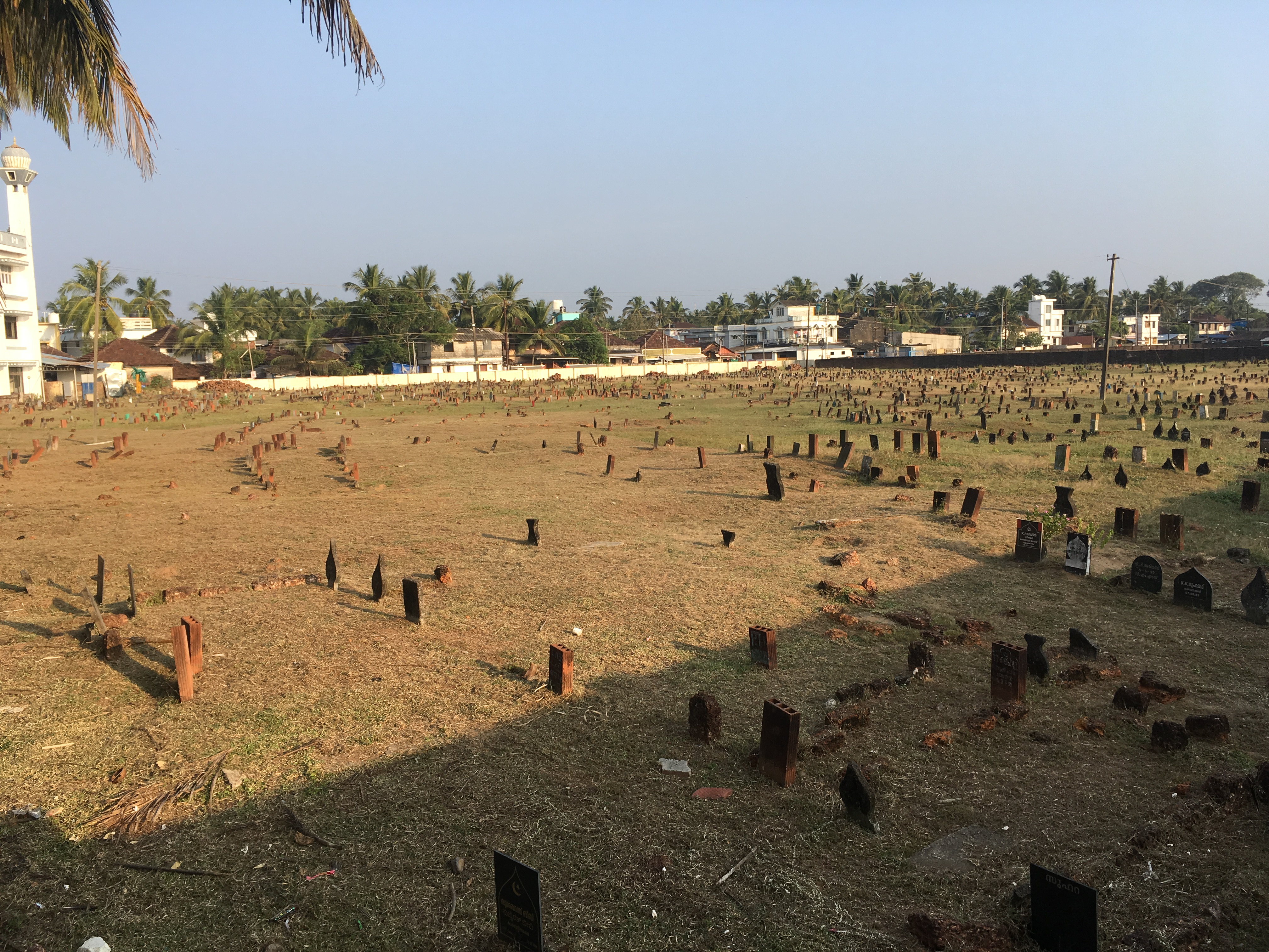 കണ്ണംപറമ്പ് ശ്മശാനം പള്ളിയുടെ തെക്കുഭാഗം